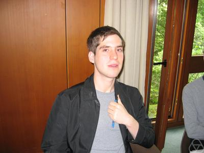 Foto di Jacob Lurie